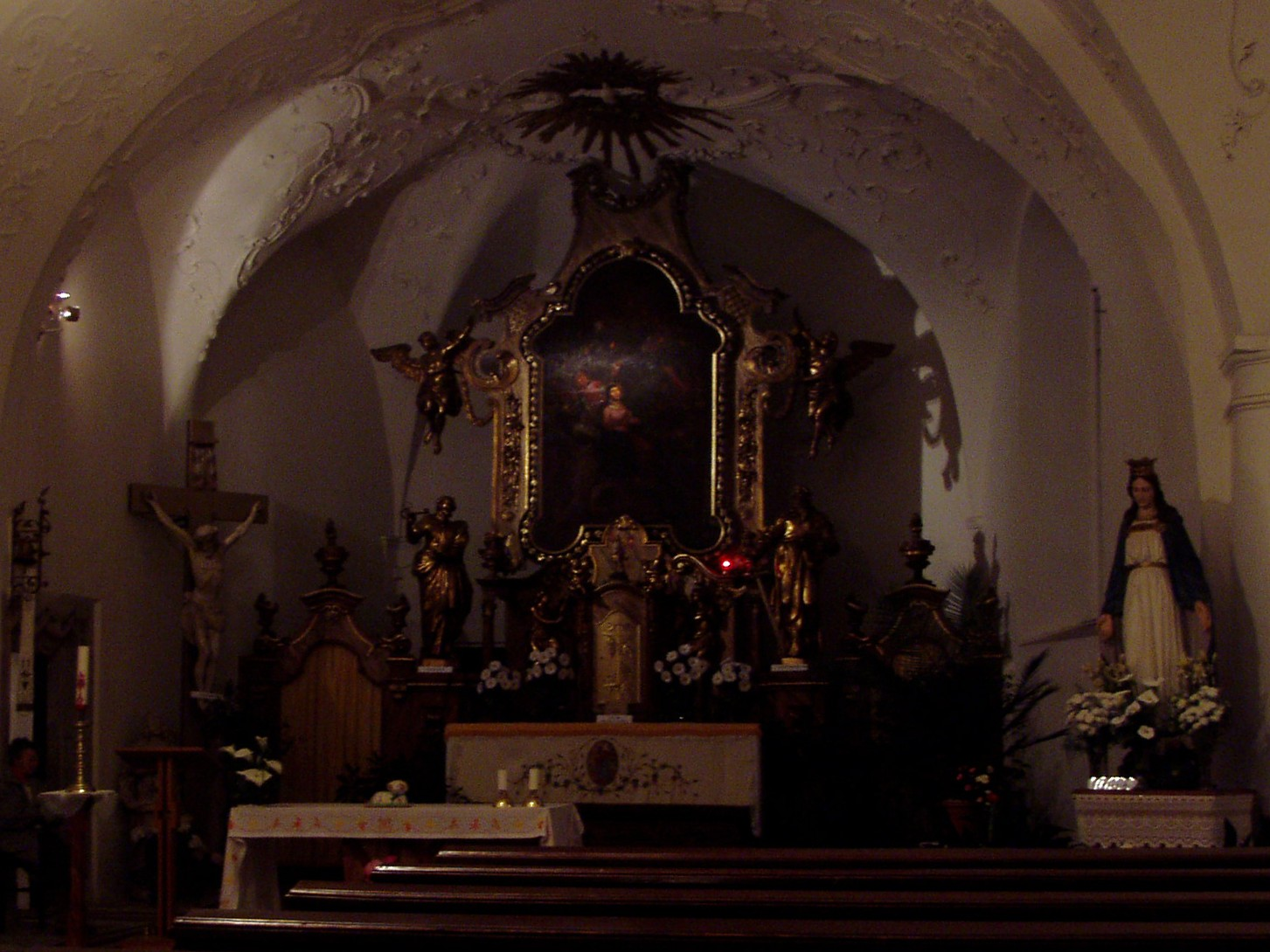 Interiér kostela Seslání Ducha svatého v Českém Dubě